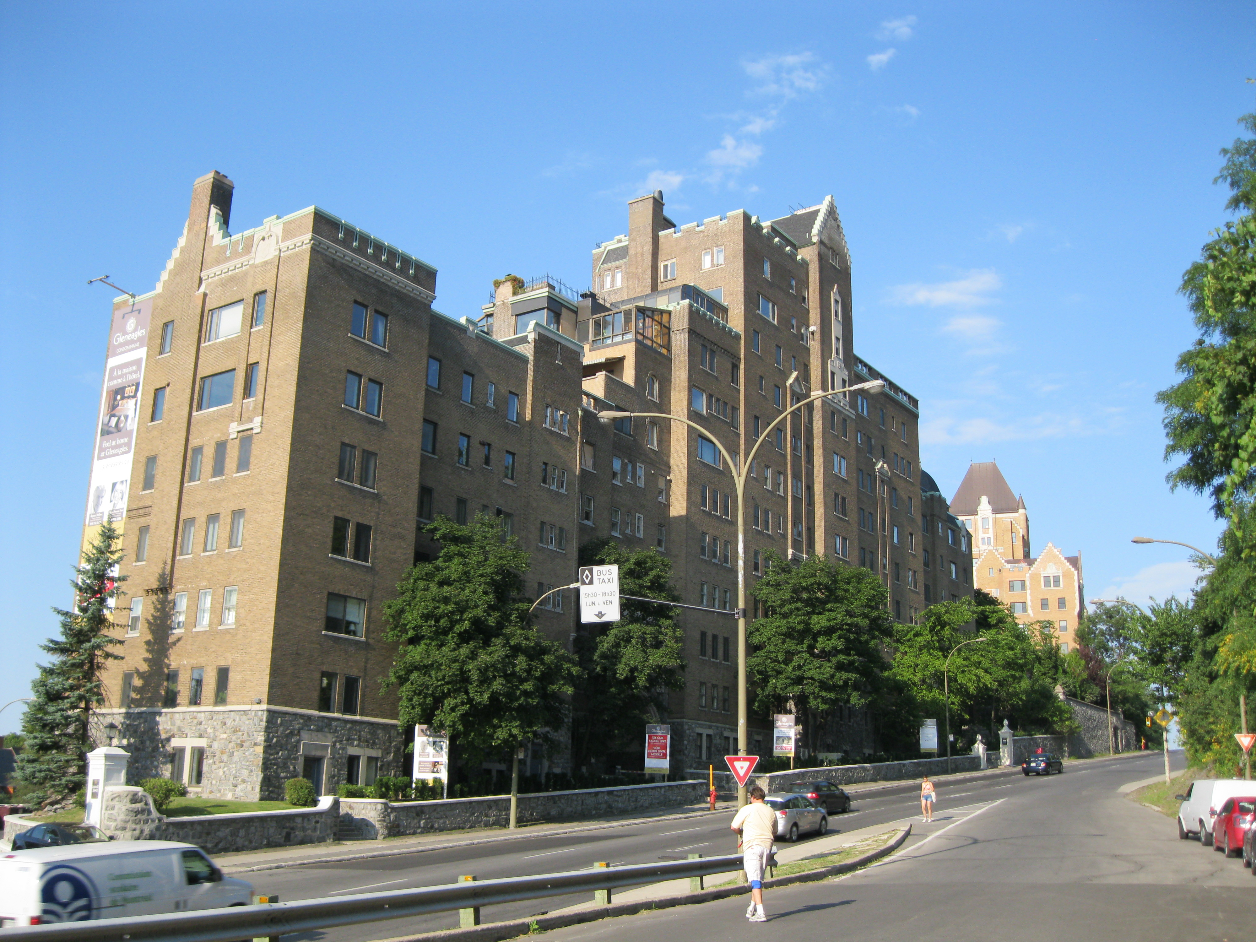 Immeuble Gleneagles, 3940, chemin de la Côte-des-Neiges, Montréal